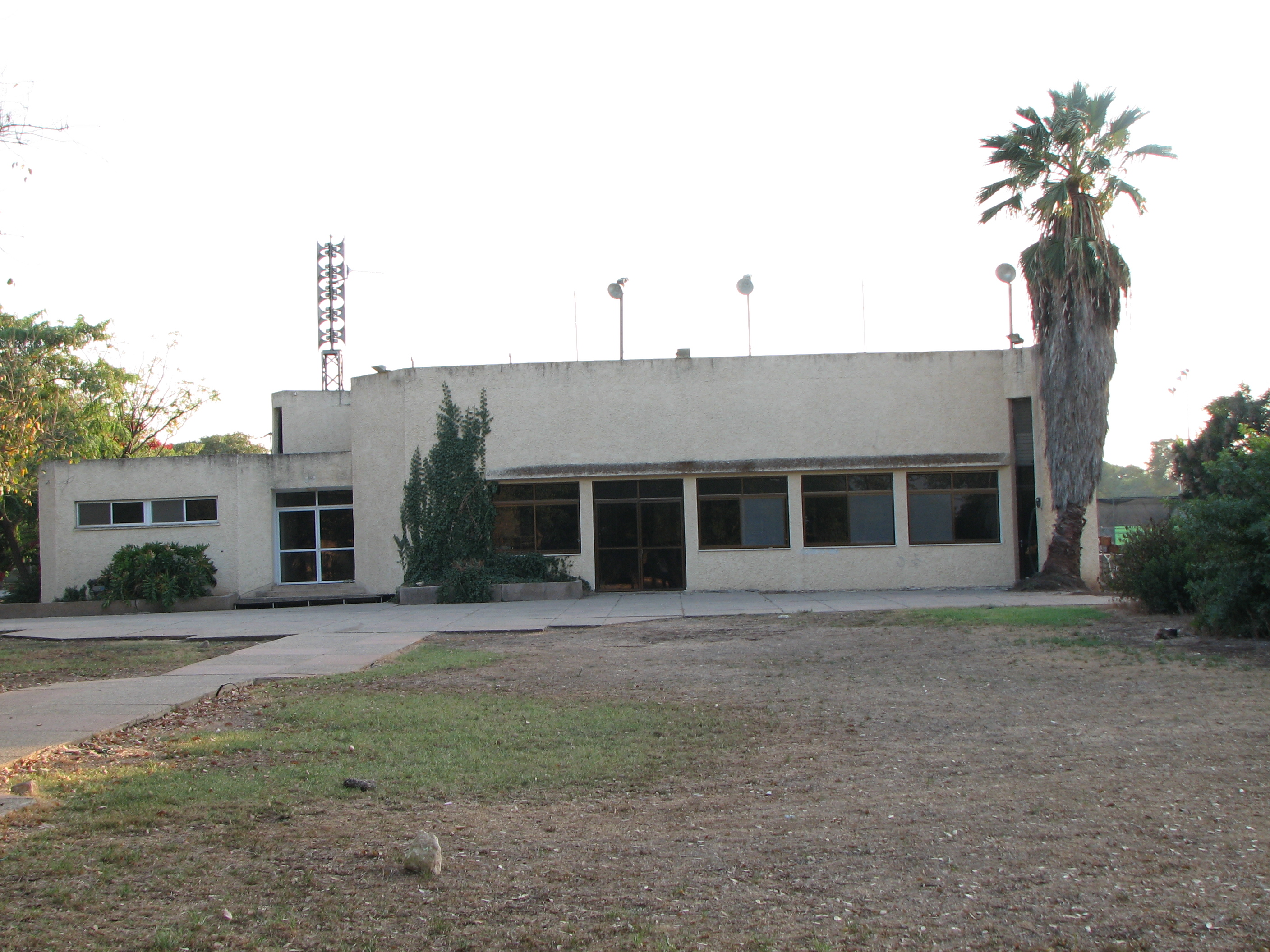 מרכז רם און